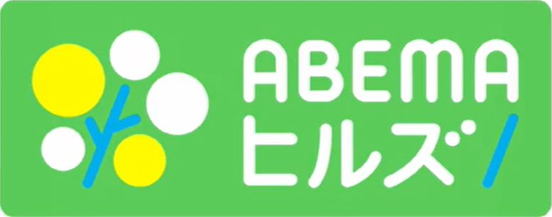 AbemaNEWS「ABEMAヒルズ」タイトルロゴ